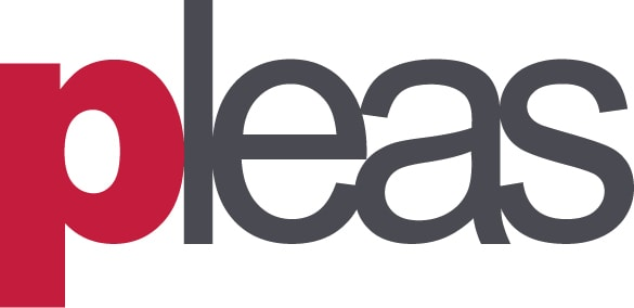 pleas_logo